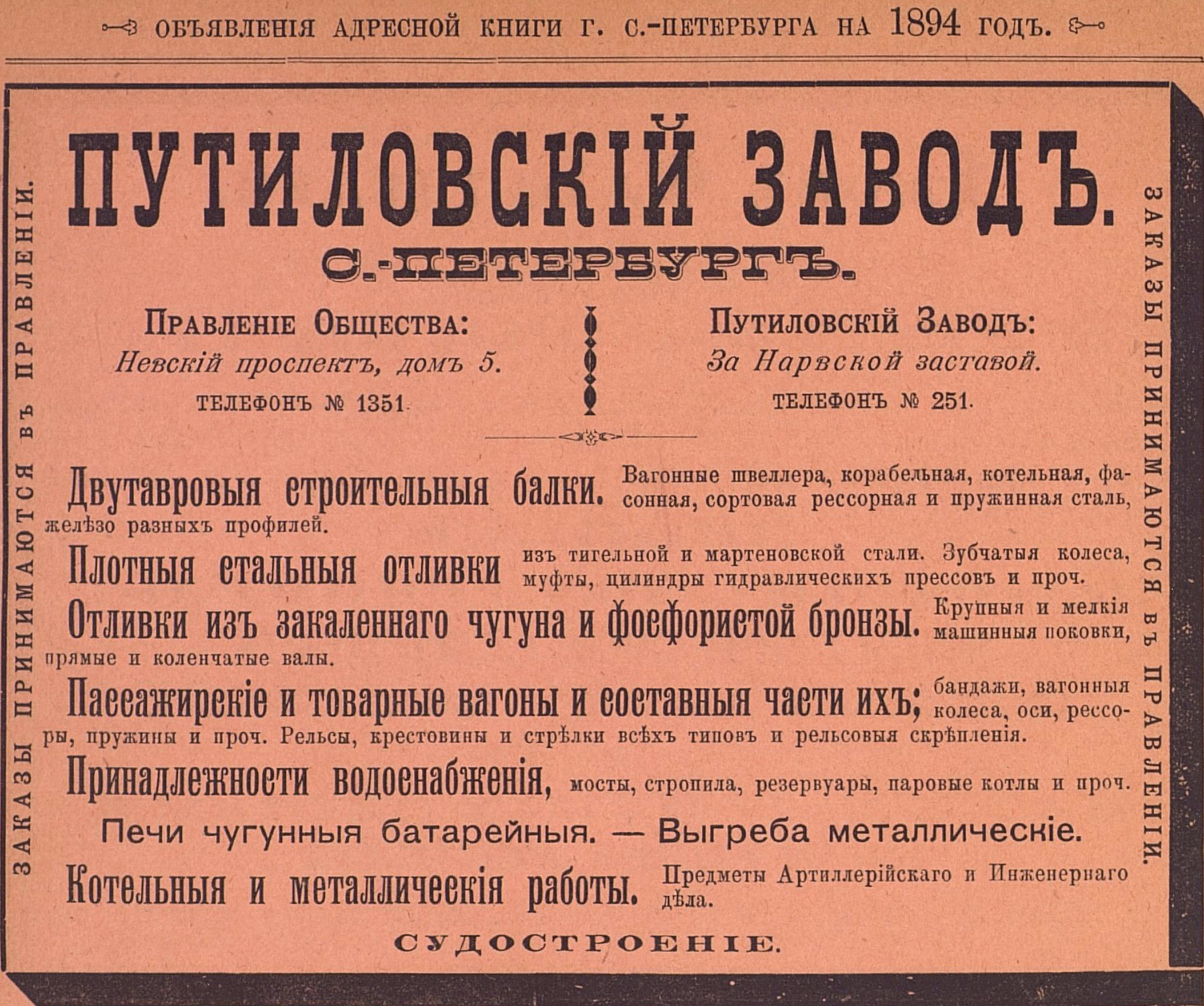 Реклама Путиловского завода, 1894 год.